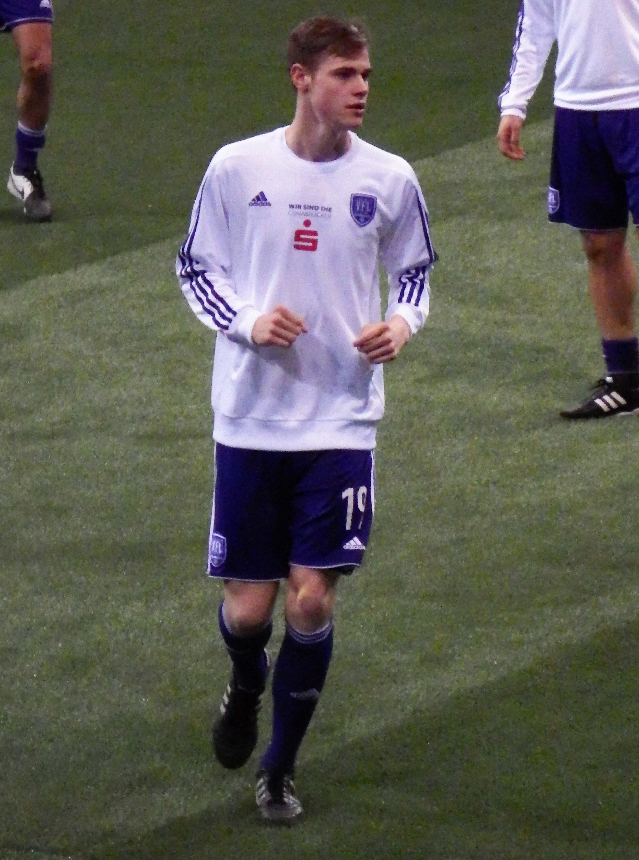 Tigges, Steffen Osnabrück 15-16